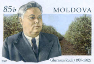 Source: Post of Moldova